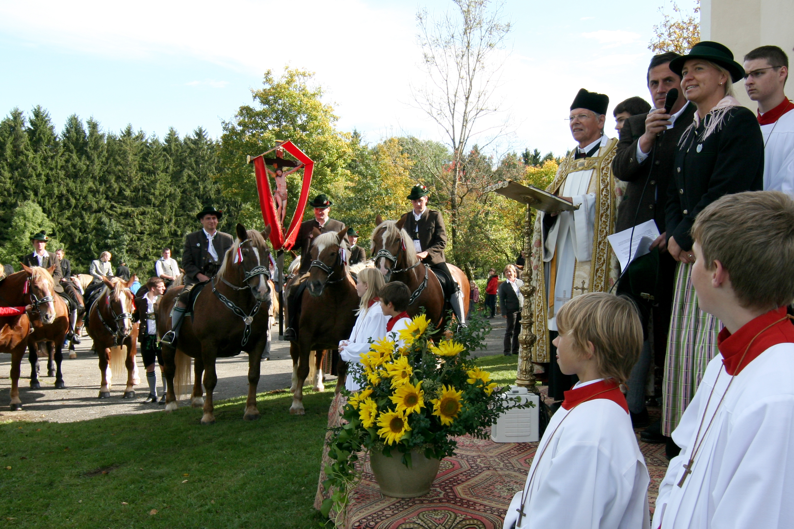 Am 14. Oktober 2012 fand erstmals wieder ein Leonhardiritt in Iffeldorf statt. Eine große Zahl von Reitern ritt mit ihren Pferden vom St.-Vitus-Platz zur Heuwinklkapelle, wo die Pferde vom Pfarrer gesegnet wurden.